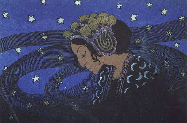 Edward Okuń, Winieta okładkowa Noc, litografia barwna, 1903. Chimera, 1904